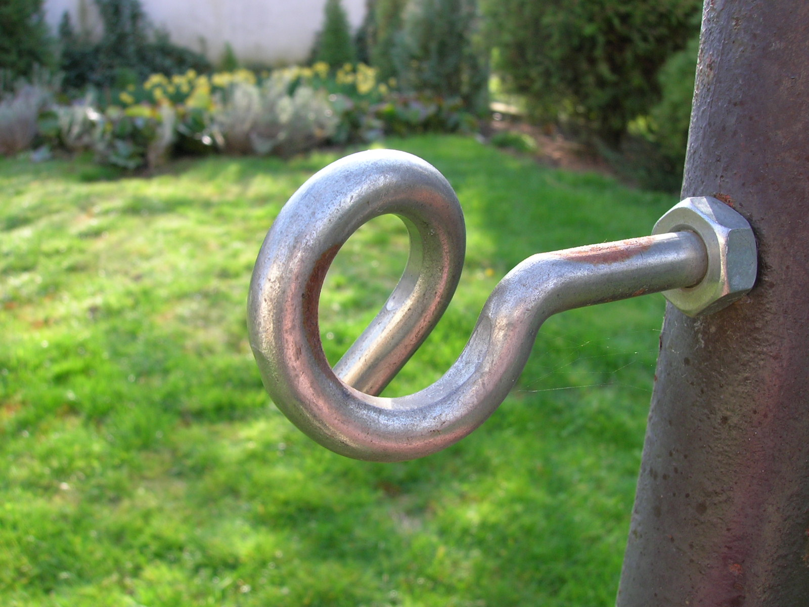 Crooked hook